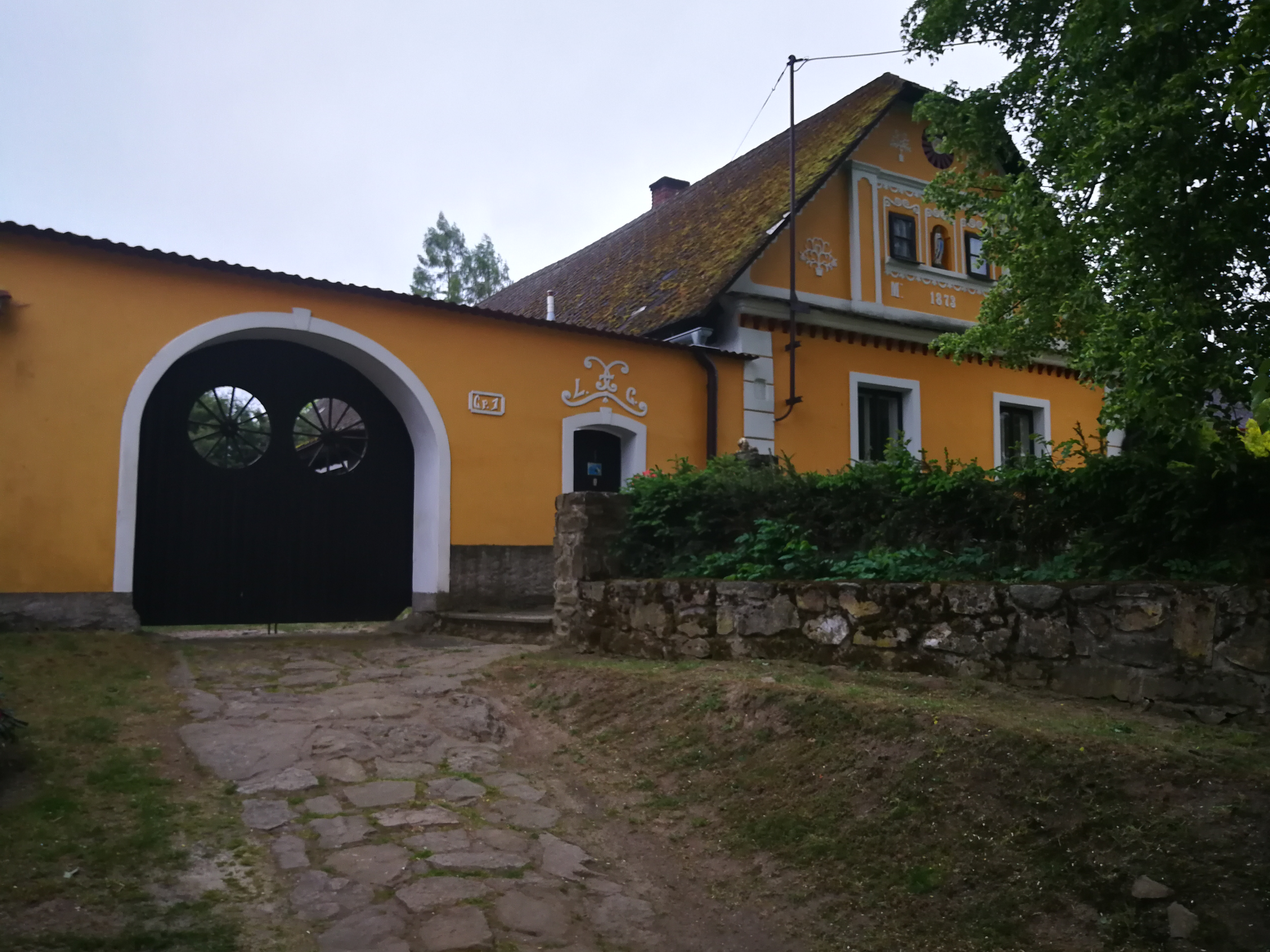 Dům č.p.1